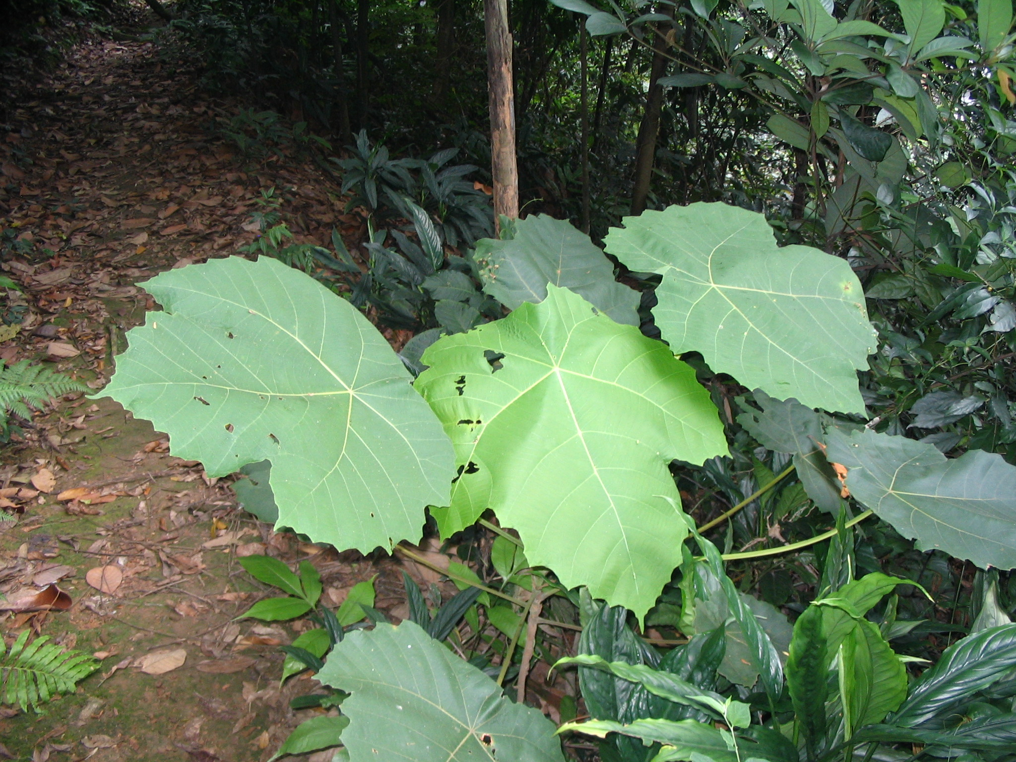 Feuilles de Macaranga gigantea - Bukit Nanas Forest Reserve - Kuala Lumpur